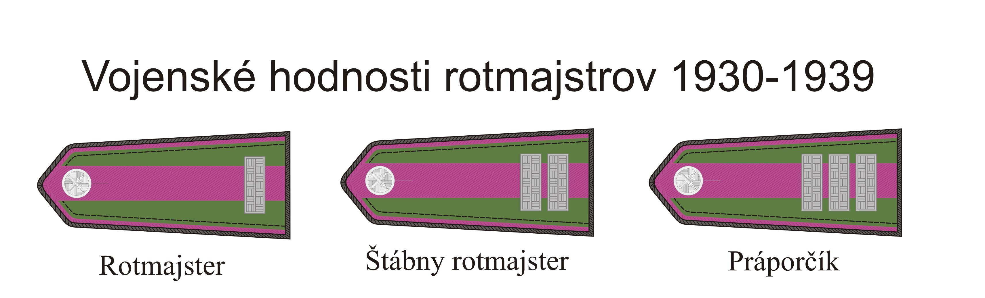 Hodnostné označenie rotmajstrov česko-slovenskej armády v rokoch 1930-1939